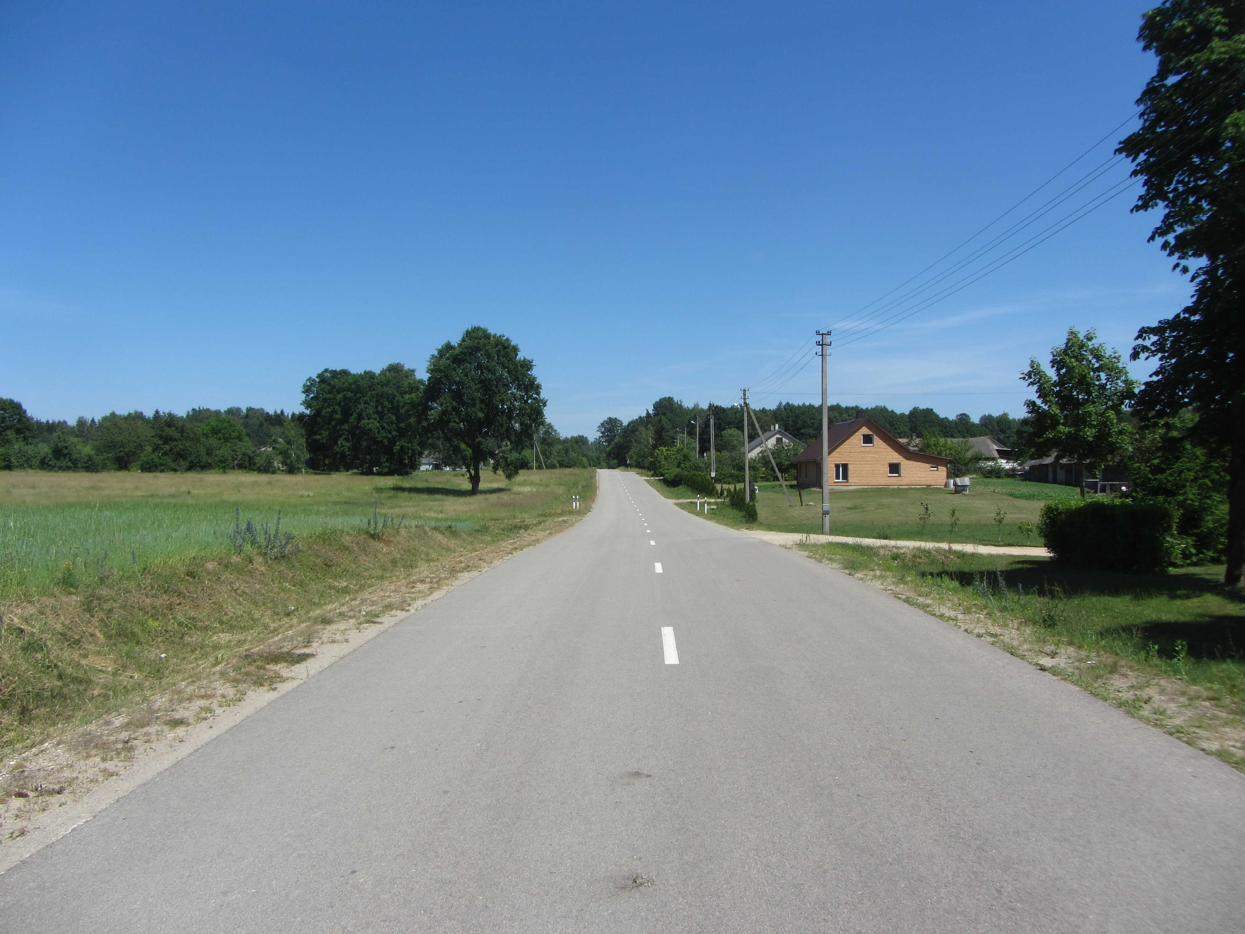 Ilgai 64120, Lithuania